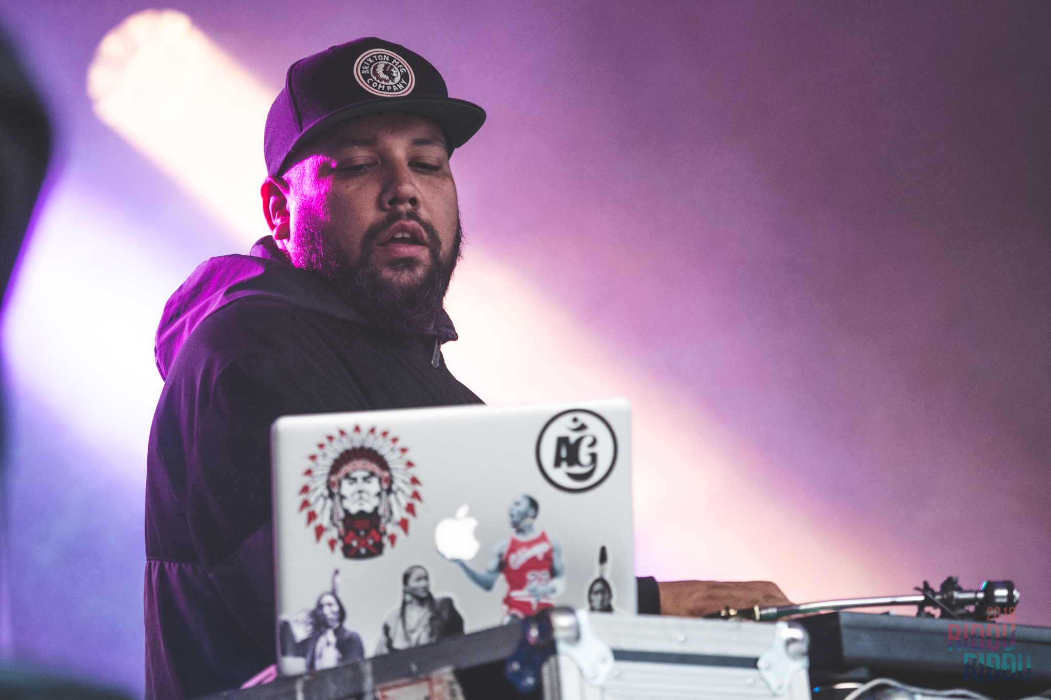 DJ SHUB på Riddu Riđđu